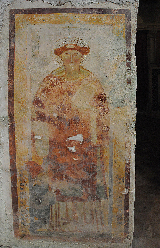 San Giovanni in Argentella - Palombara Sabina